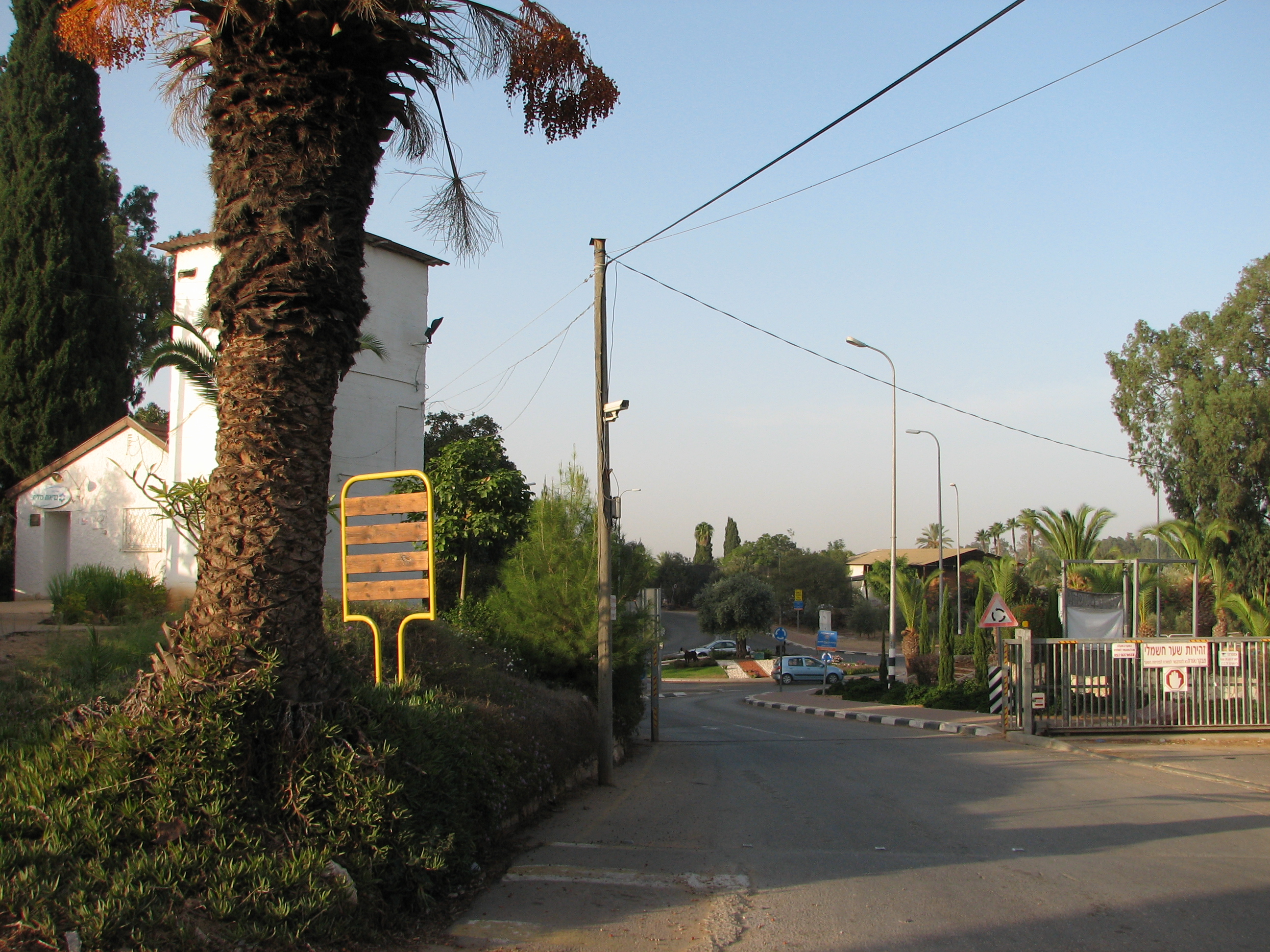 Gan HaShomron is a moshav located north-east of Hadera מושב גן השומרון שוכן על הכביש לעפולה, צפונית מזרחית לחדרה, לפני צומת עירון ליד דרך הדורות. מבט מהשכונה המזרחית לכוון כביש 6403 והשכונה המערבית